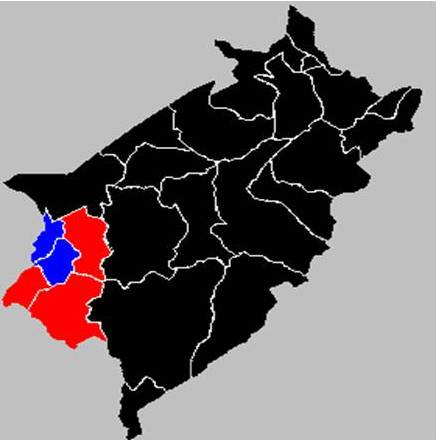 Zona del Mocotíes